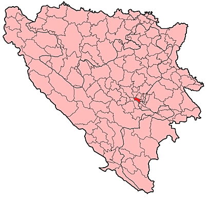 Općina Novi Grad u Bosni i Hercegovini.